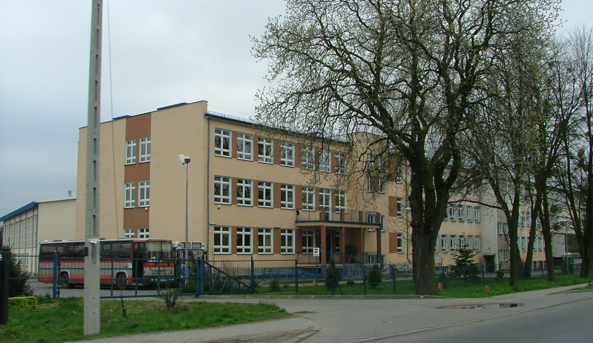 PL, Poland, województwo lubelskie, Kurów